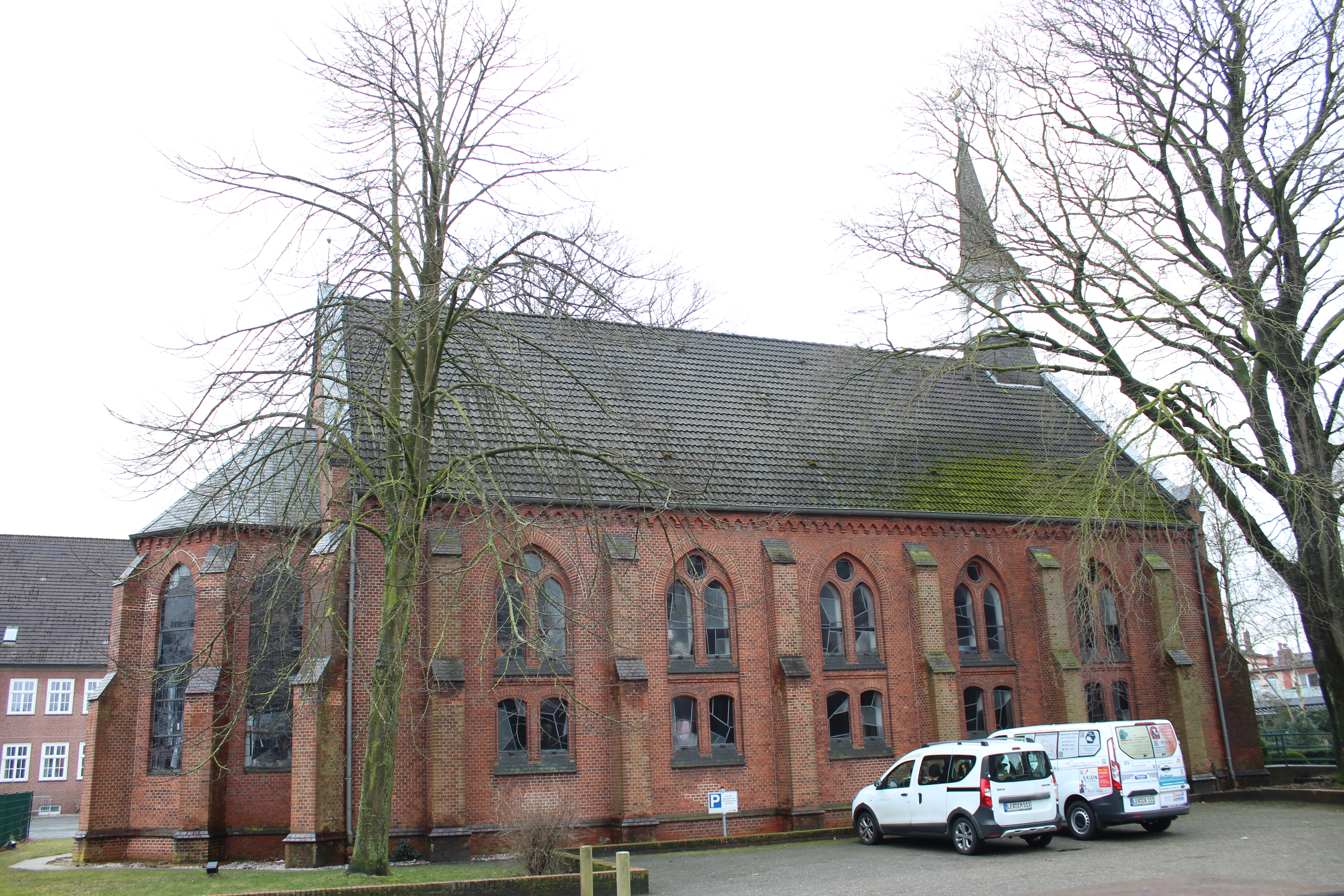 Christuskirche, Leer (Ostfriesland), Niedersachsen, Deutschland